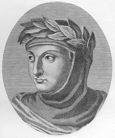 Giovanni Boccaccio (1313–1375), italienischer Humanist